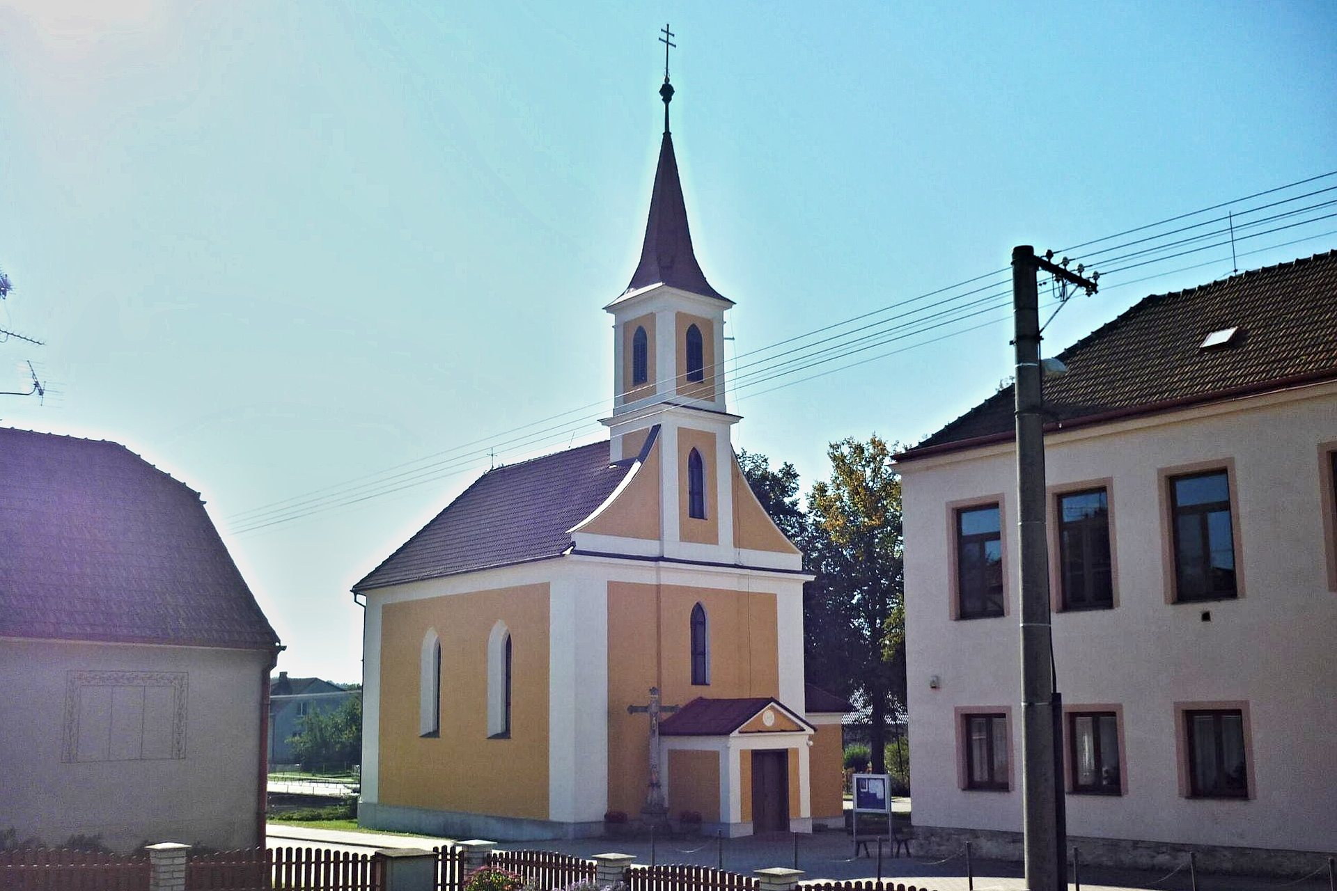 Kostel sv. Václava v Třeběticích